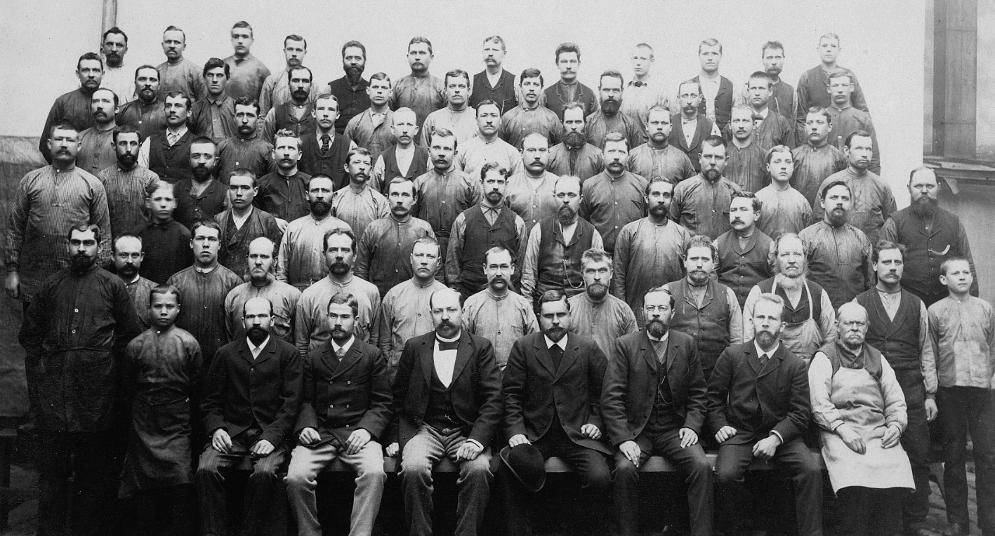 Göranssons mekaniska verkstad, personal